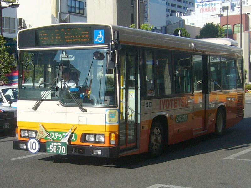 登録番号 愛媛200か50-70 伊予鉄道所属 2007年5月20日 松山市駅前にて撮影